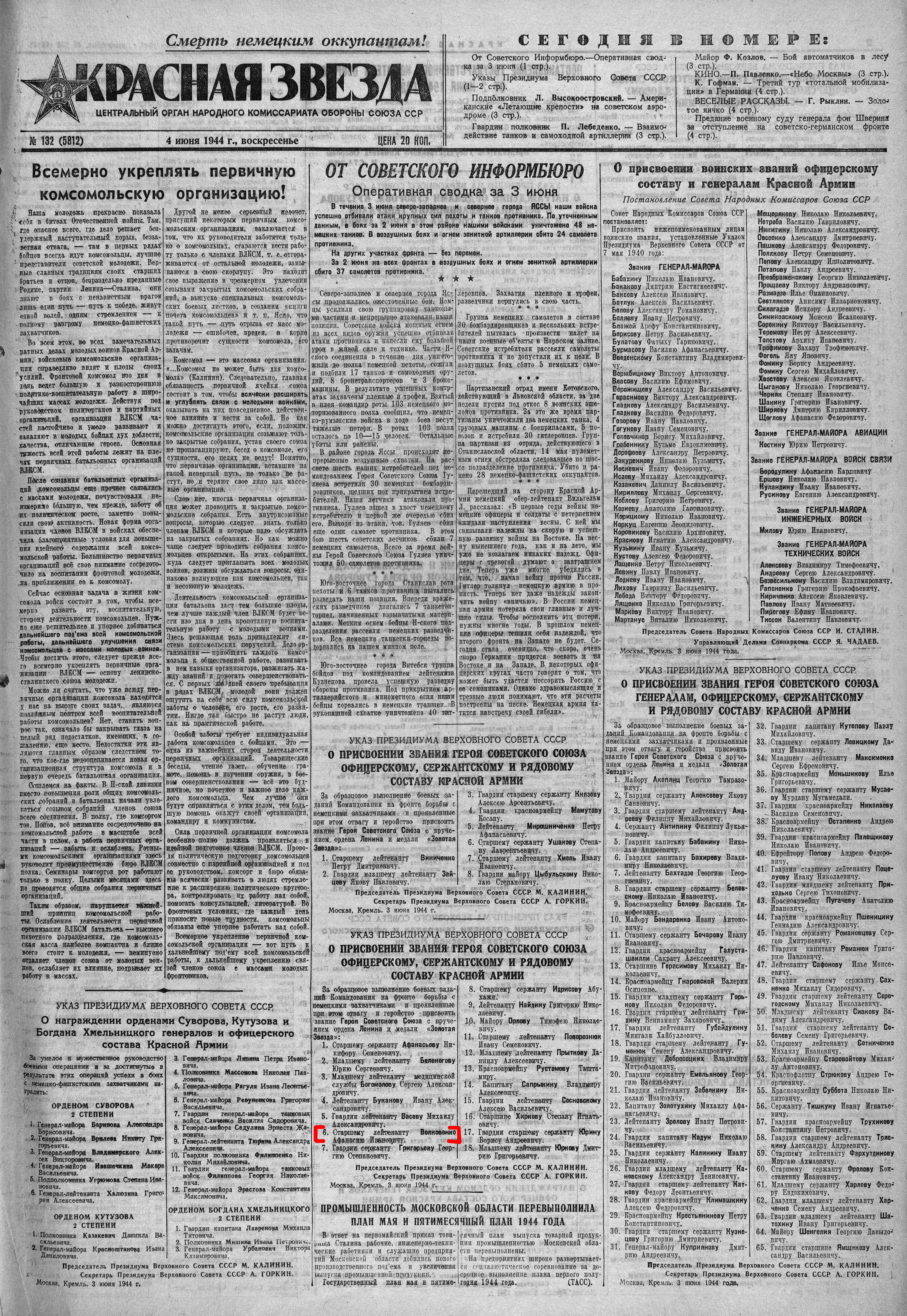 Фото первой страницы газеты "Красная звезда" за 4 июня 1944 года.